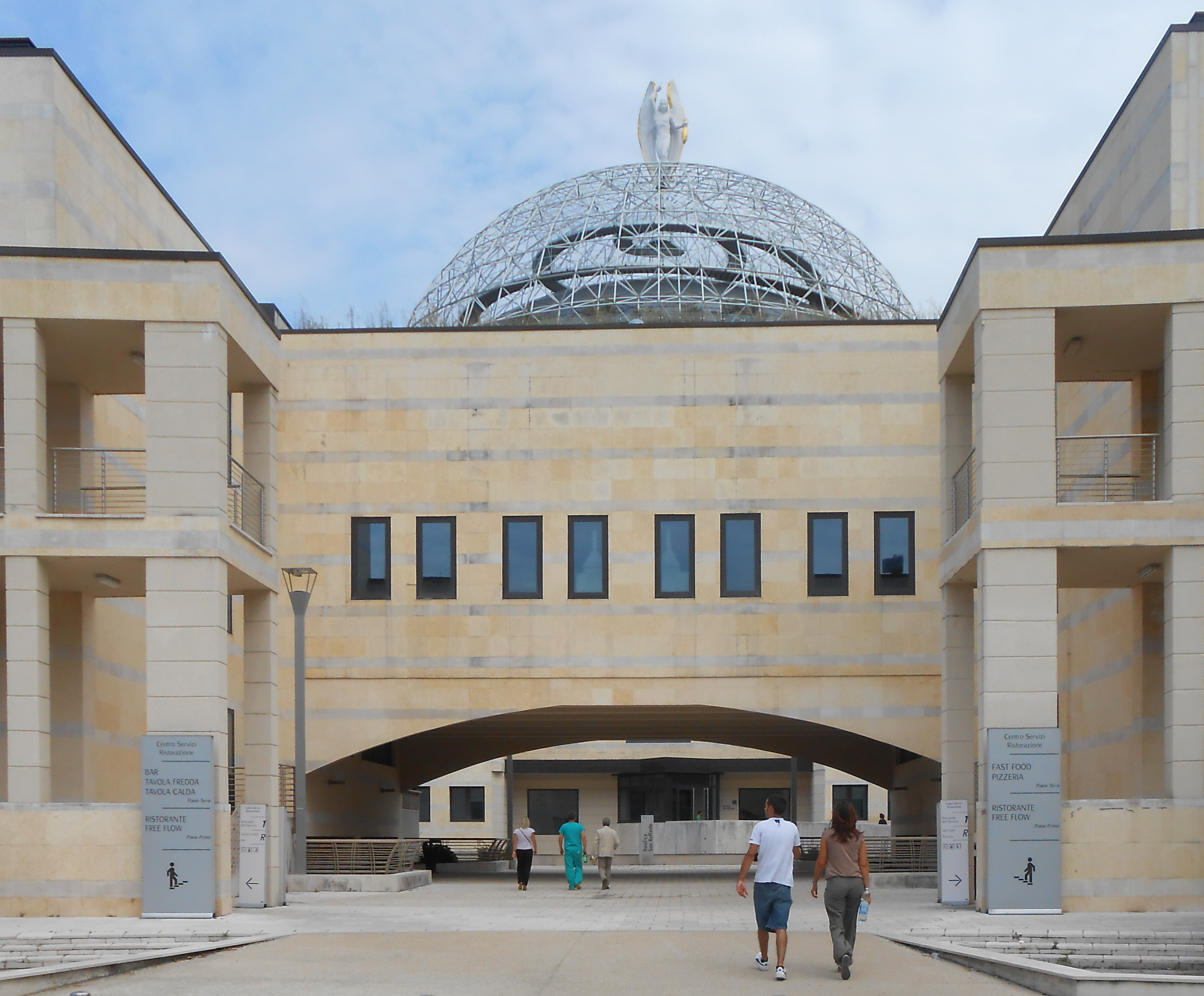 Inglesso della Basilica e del Centro Servizi dell'ospedale